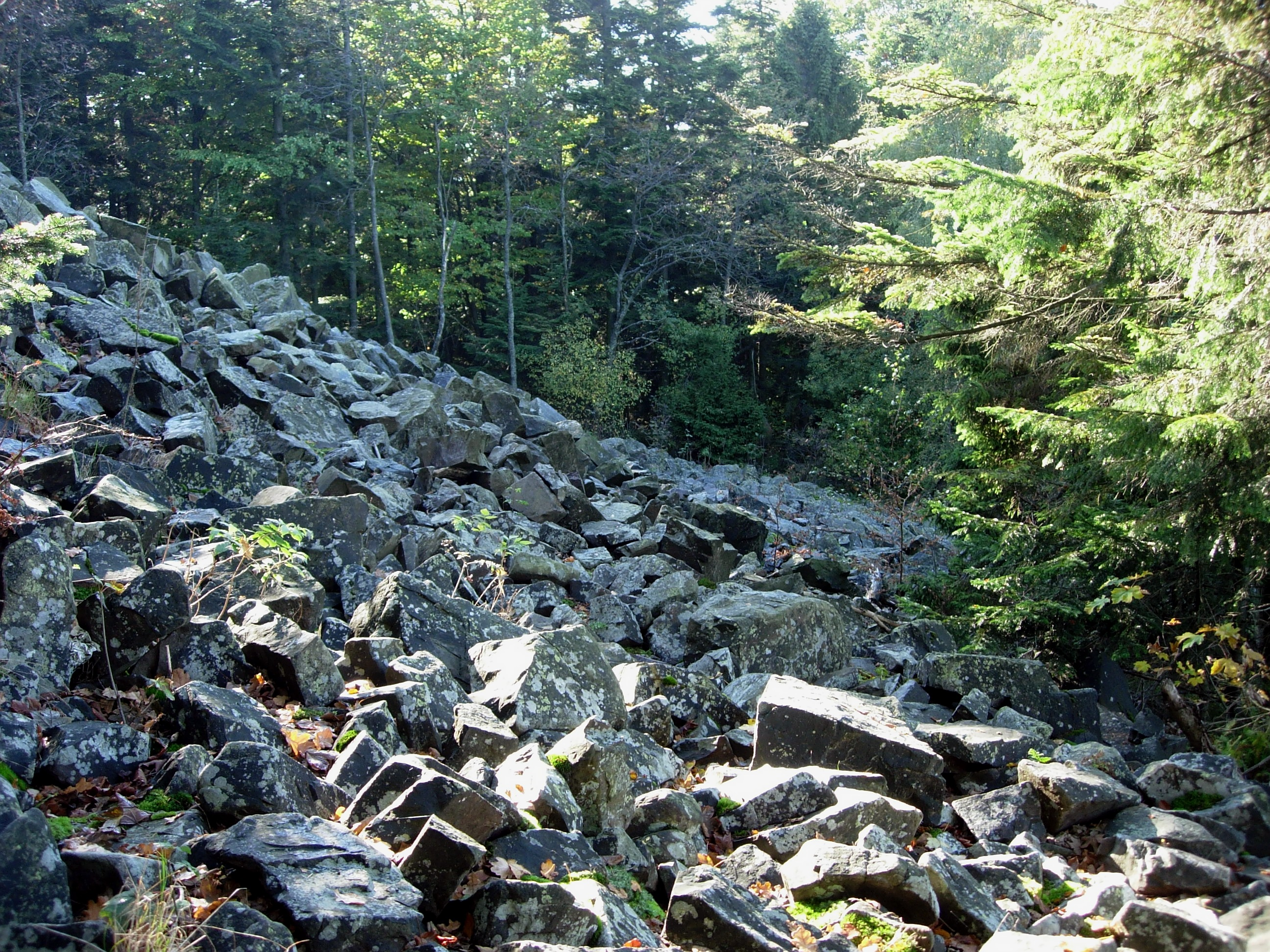 Gołoborze na szczycie Łysicy w Górach Świętokrzyskich